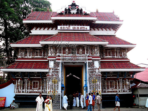 Paramekkav Temple